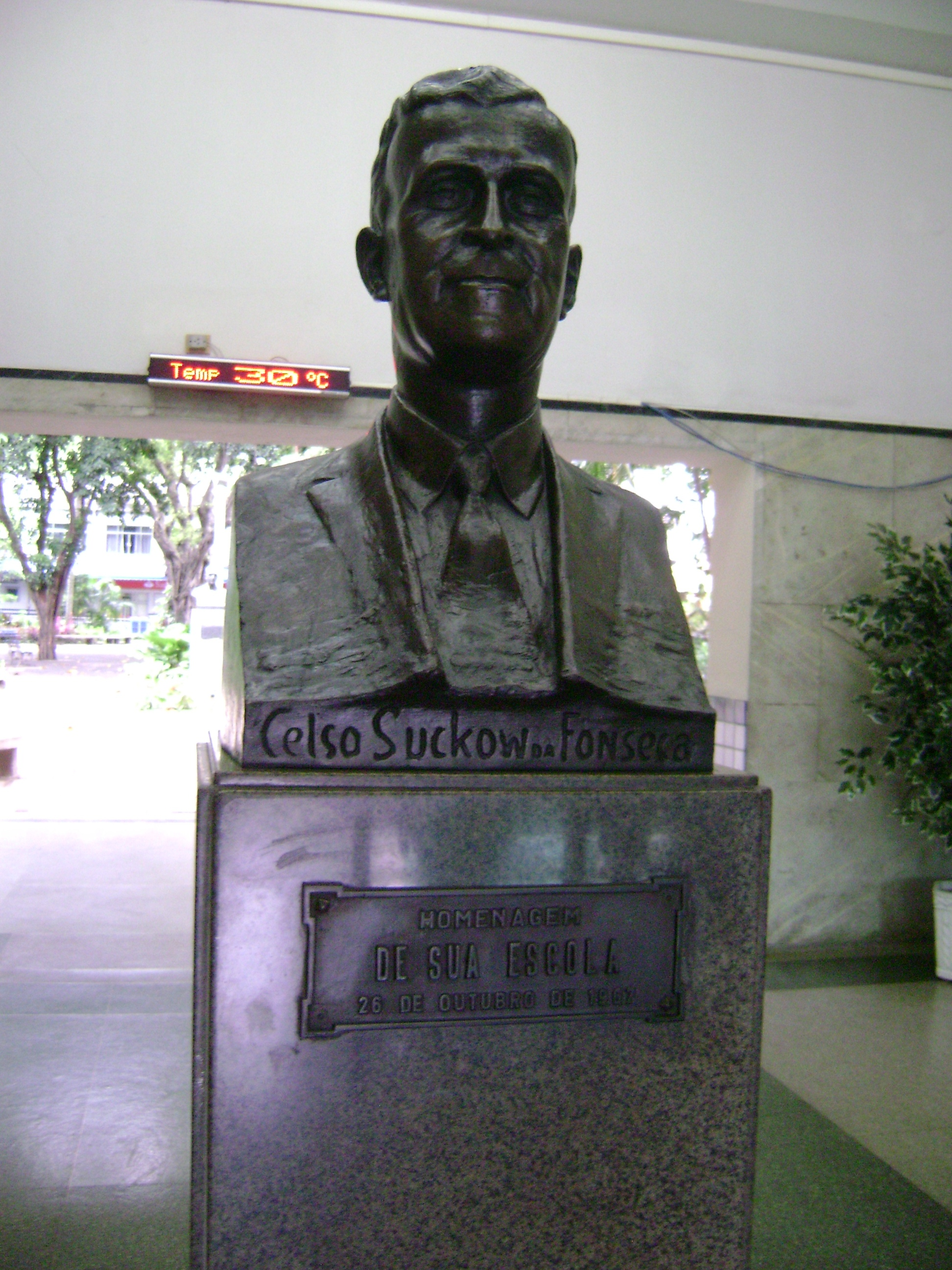 Estátua de Celso Suckow da Fonseca dentro do campus Maracanã do Cefet/RJ.